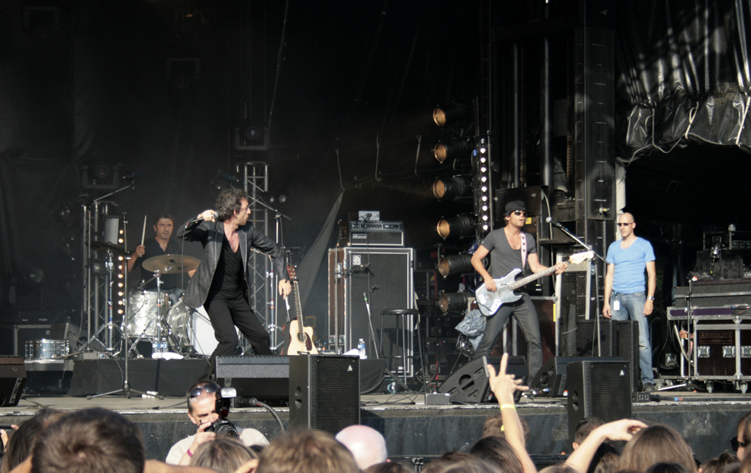 Arthur H photographié lors de la première édition du festival de Beauregard en 2009